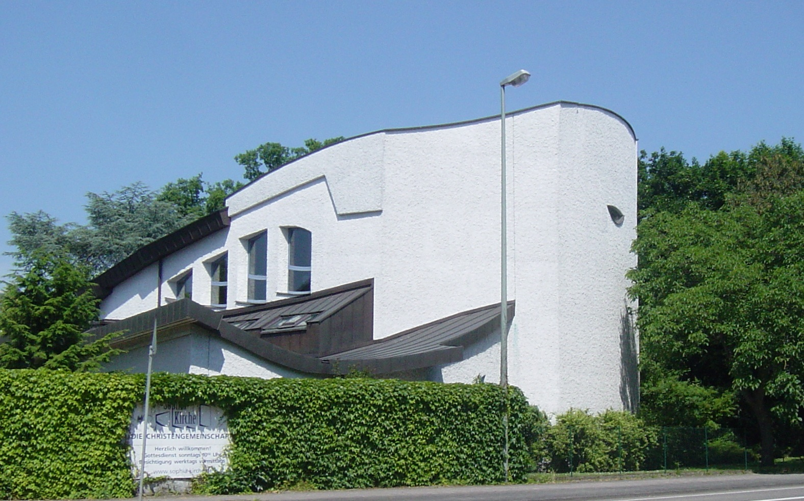 Frankfurt Bockenheim, Frauenlobstraße 2. Die Sophia-Kirche der Christengemeinschaft ist nicht die „Anthroposophenkirche”, wohl aber die einzige christliche Gemeinschaft, die die Anthroposophie Rudolf Steines anerkennt und deren entscheidende Hilfe für die Erweiterung und Erneuerung der Theologie aufgenommen hat.